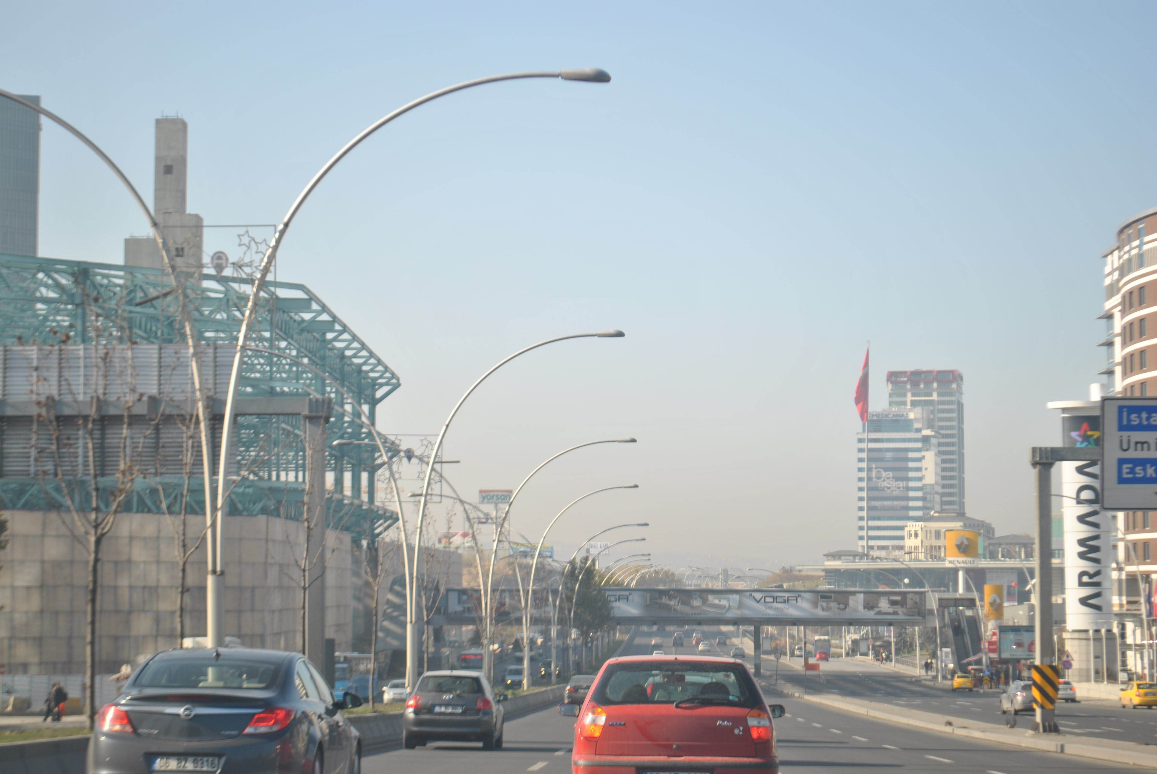 Eskişehir yolu, Ankara, Türkiye